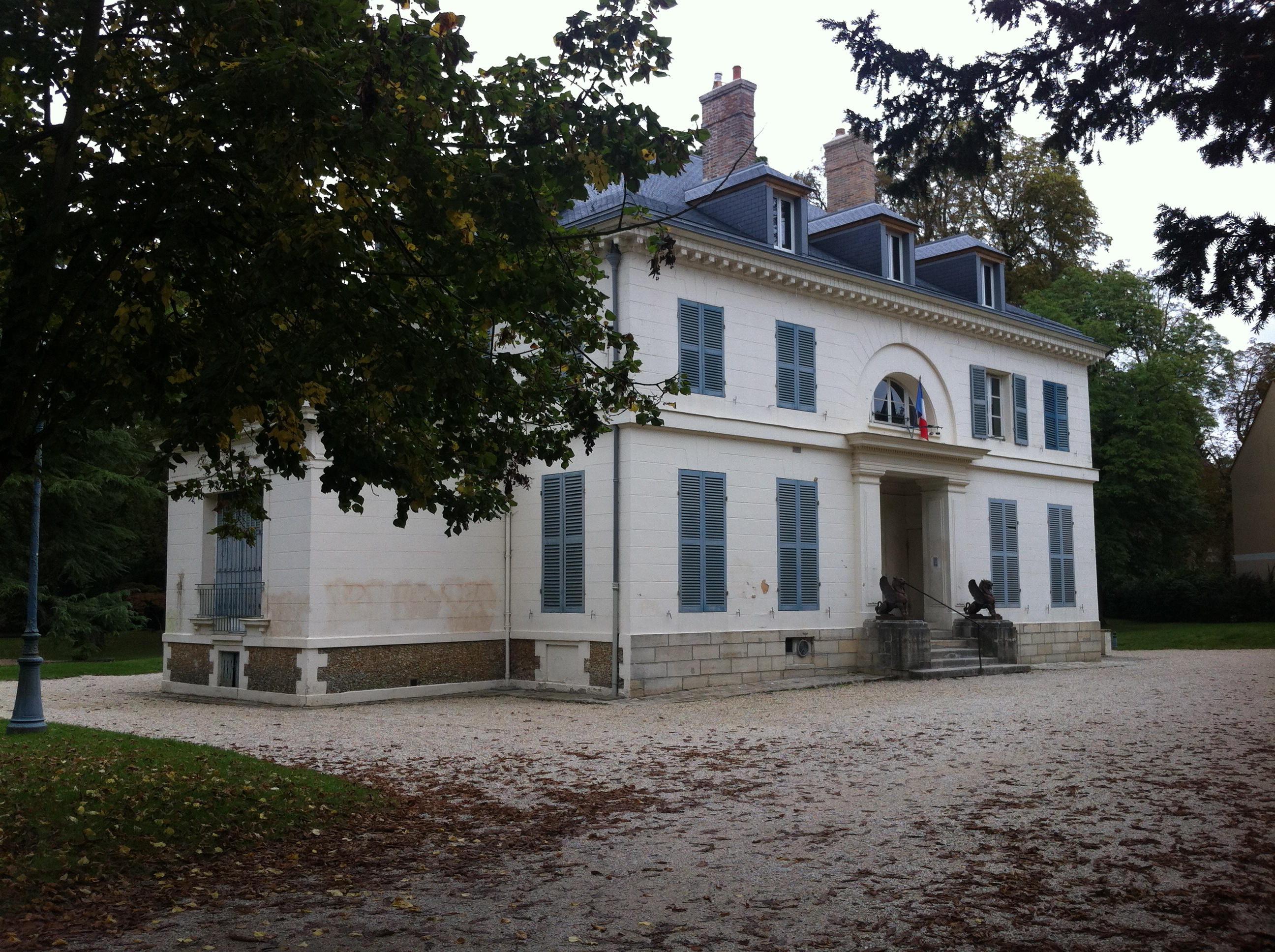 Mairie de Seine-Port - façade Ouest